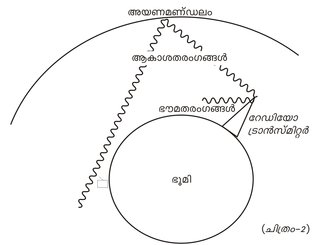 ഷോർട്ട് വേവ് ബാൻഡിൽ തരംഗങ്ങൾ സഞ്ചരിക്കുന്നത്.